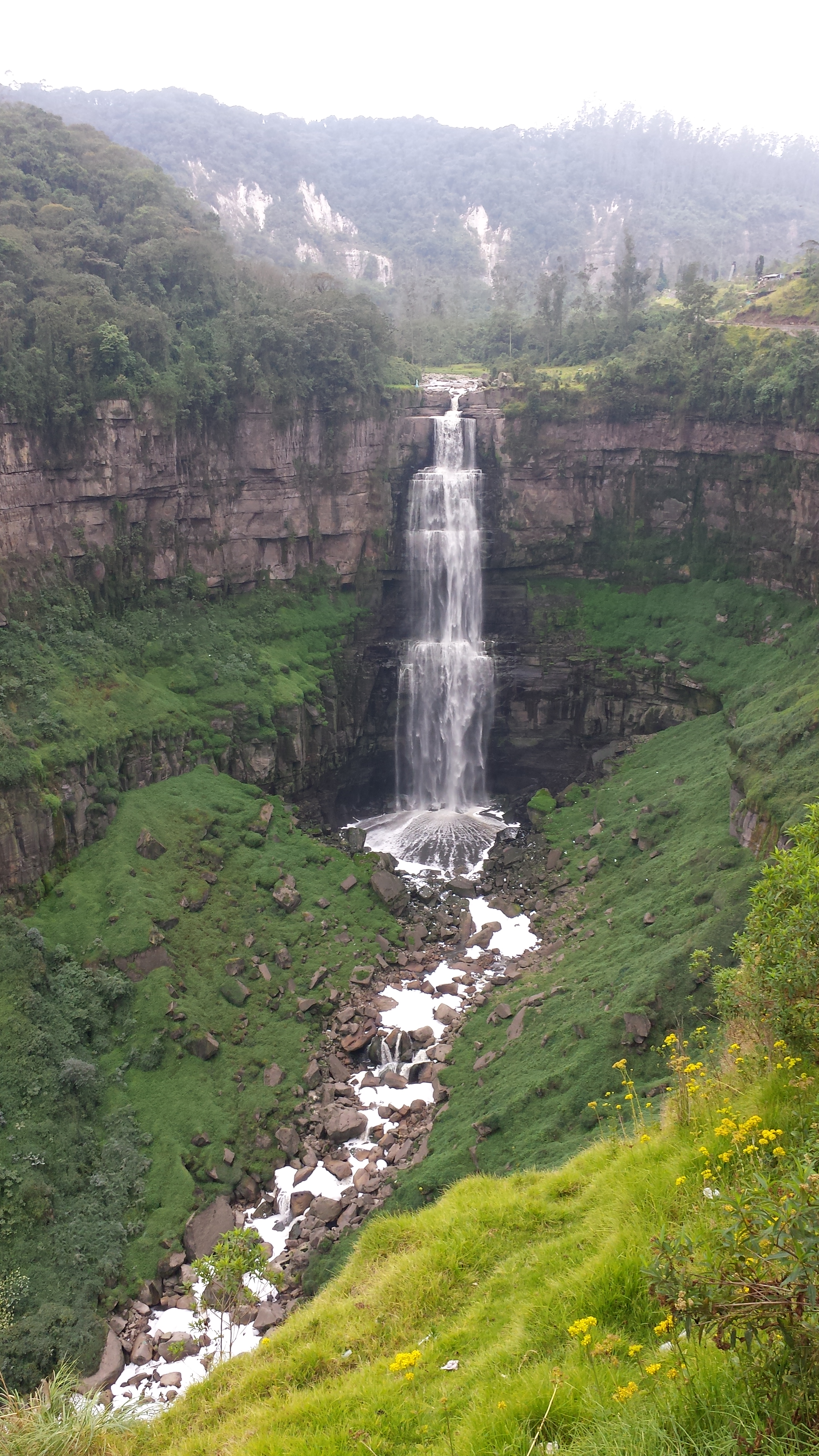 Salto Tequendama Colombia